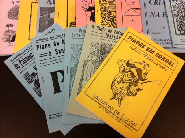 Echantillon de différents fascicules de la littérature du cordel